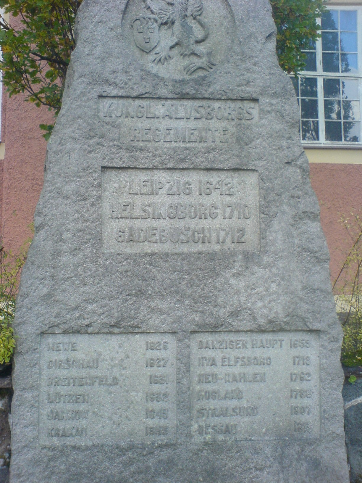 En bild som visar minnesstenen från Älvsborgs regemente